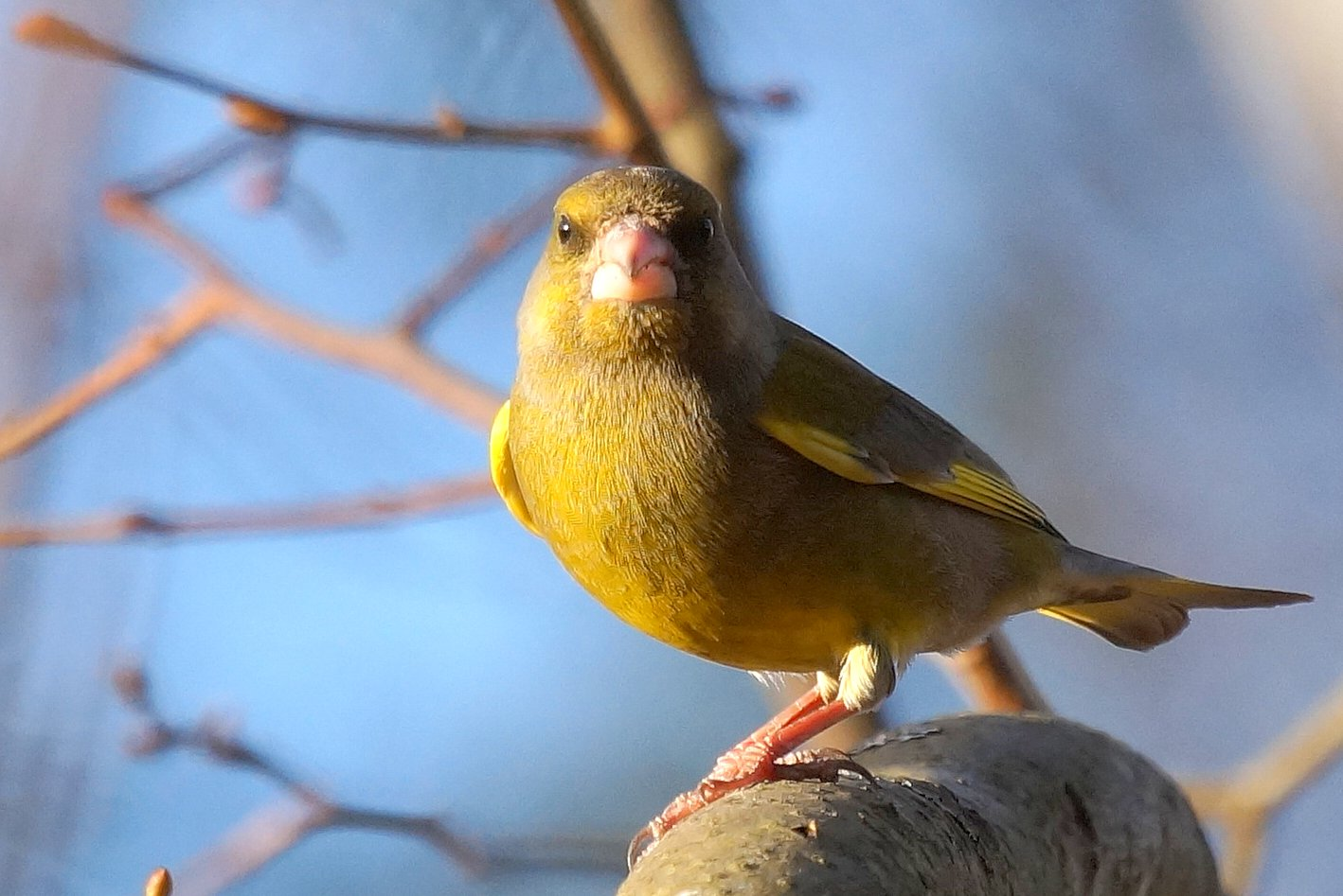 Viherpeippo koiras